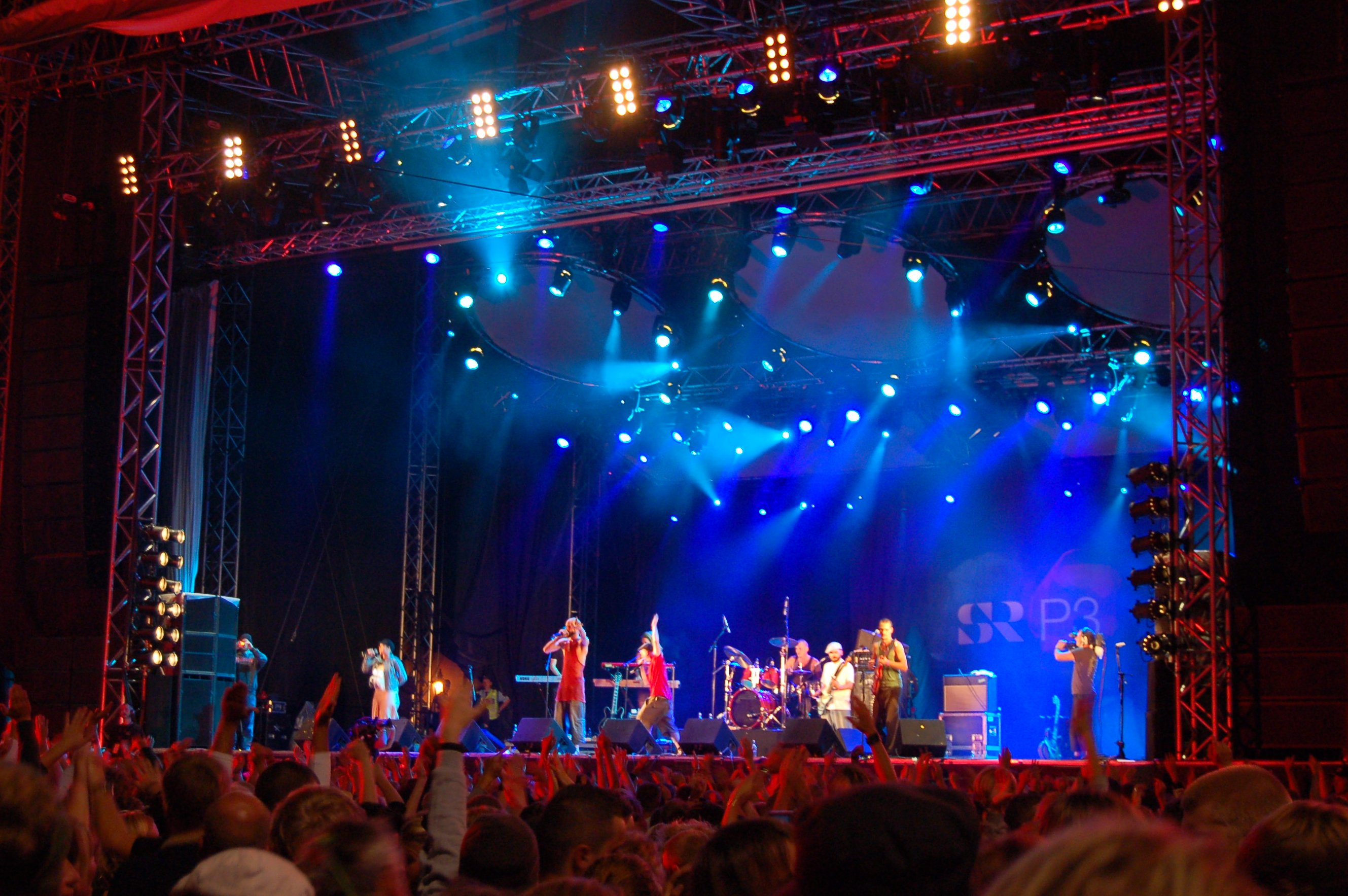 Svenska akademien (musikgrupp)